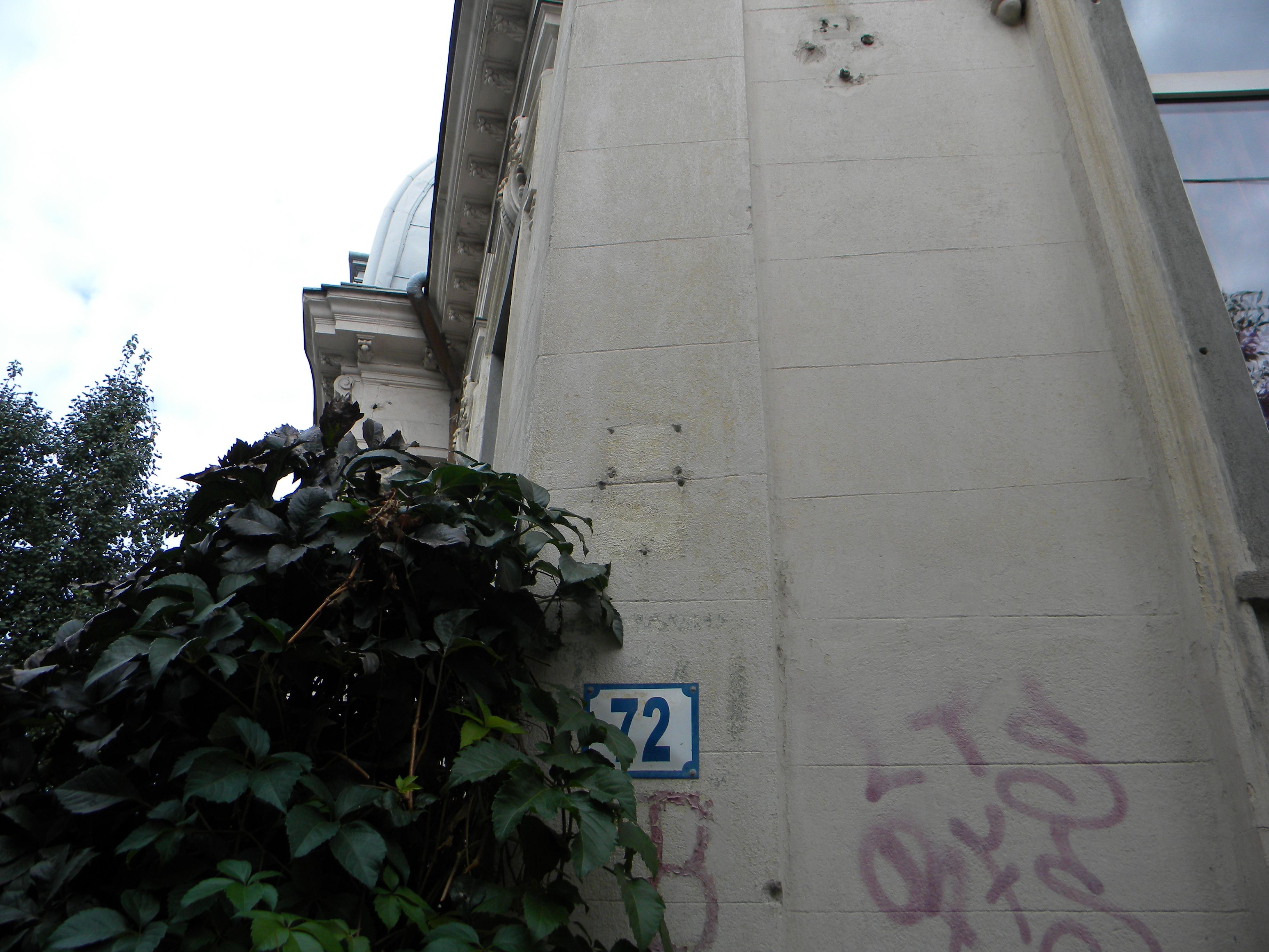 Bucuresti, Romania, Casa pe Calea Plevnei nr. 72 (detaliu 3)